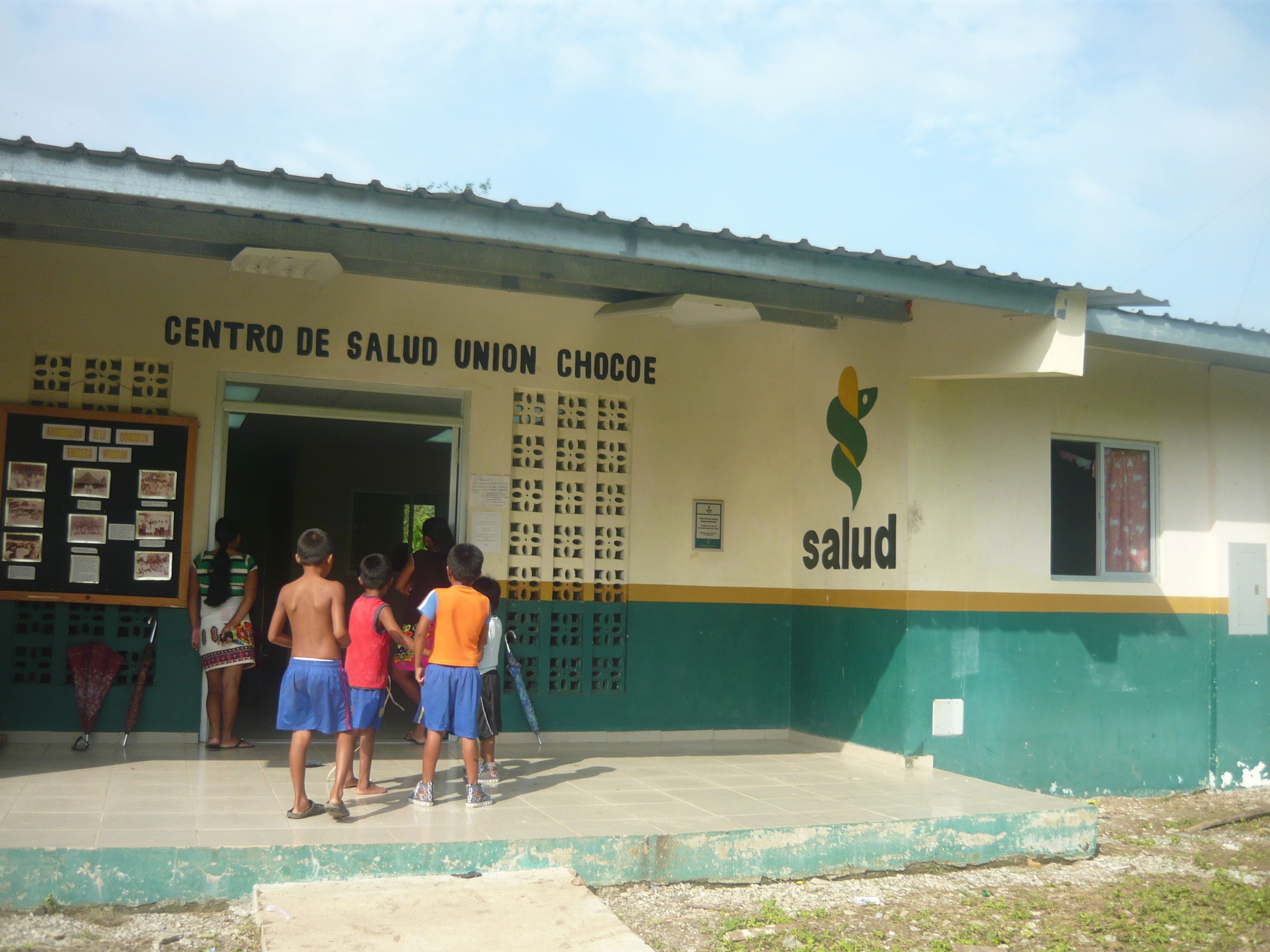 Es tomada en la comarca Embera Wounaan